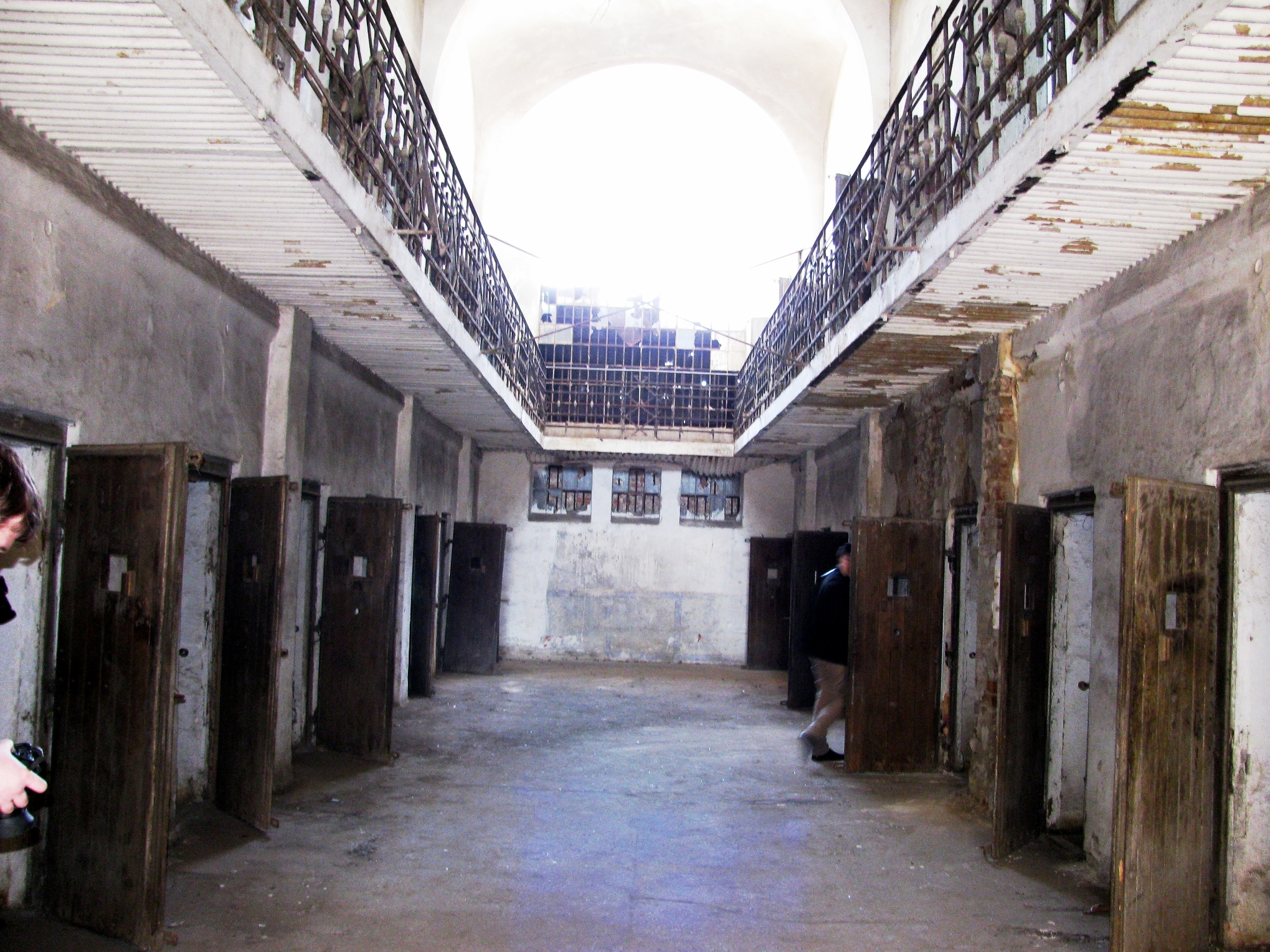 Au fost 32 de celule amplasate pe doua nivele.